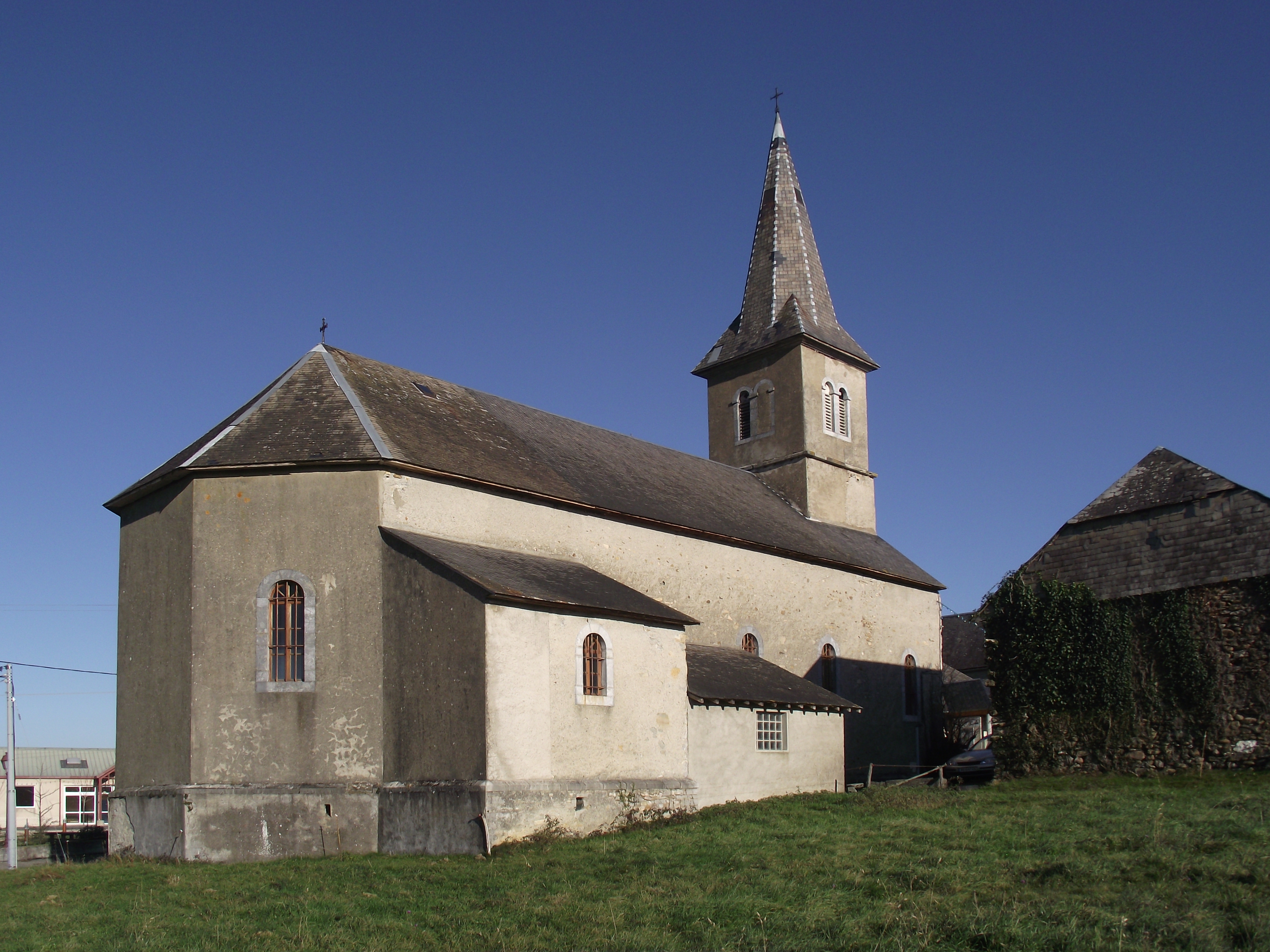 Église d'Artiguemy (Hautes-Pyrénées, France)